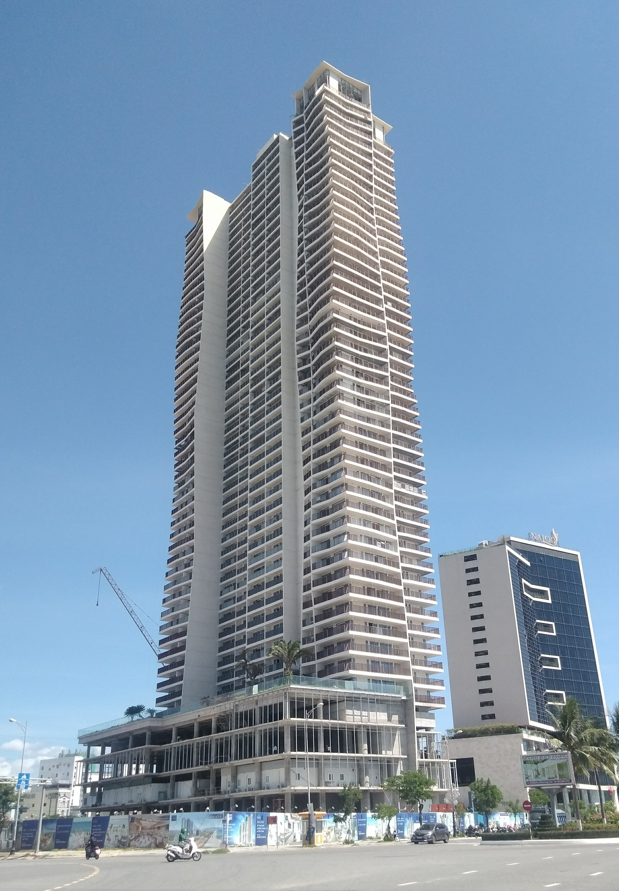 Wyndham Soleil Đà Nẵng, Tháp D